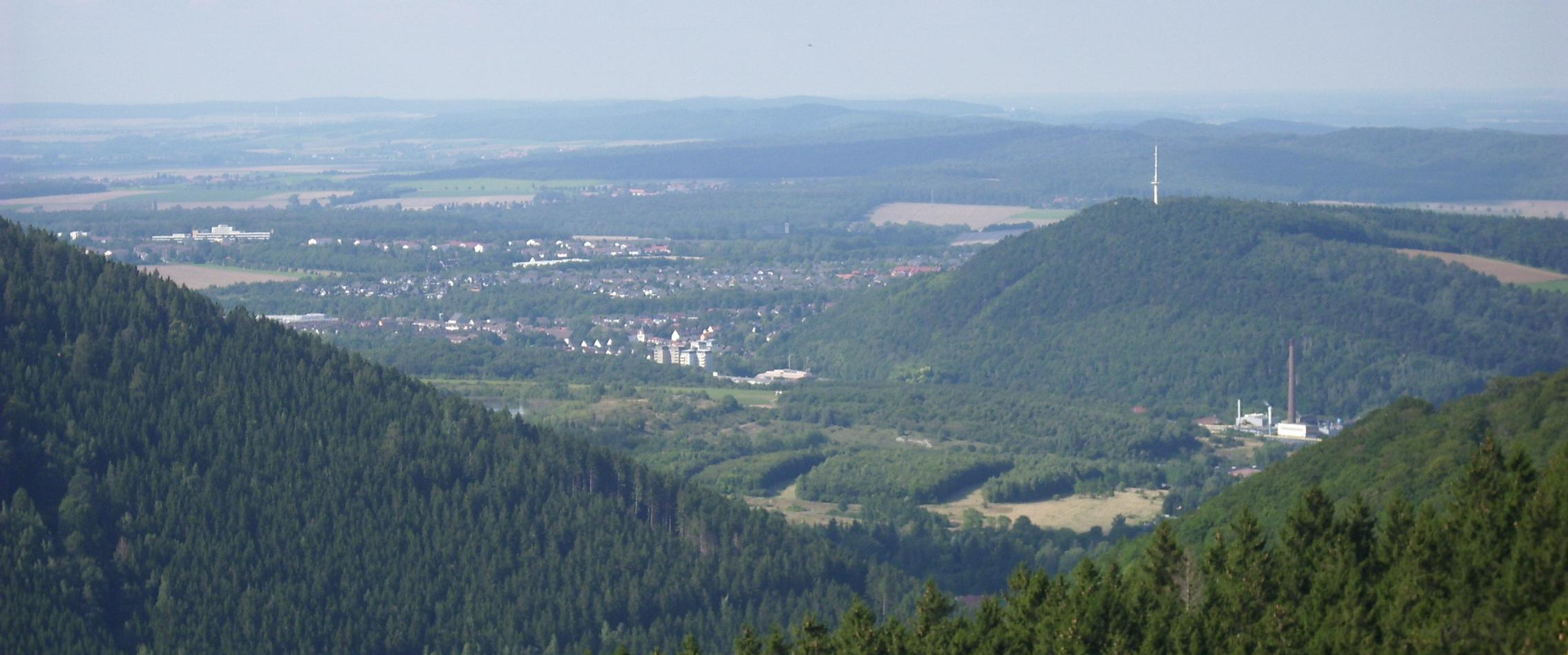 Blick über Oker bis Goslar vom Adenberg aus